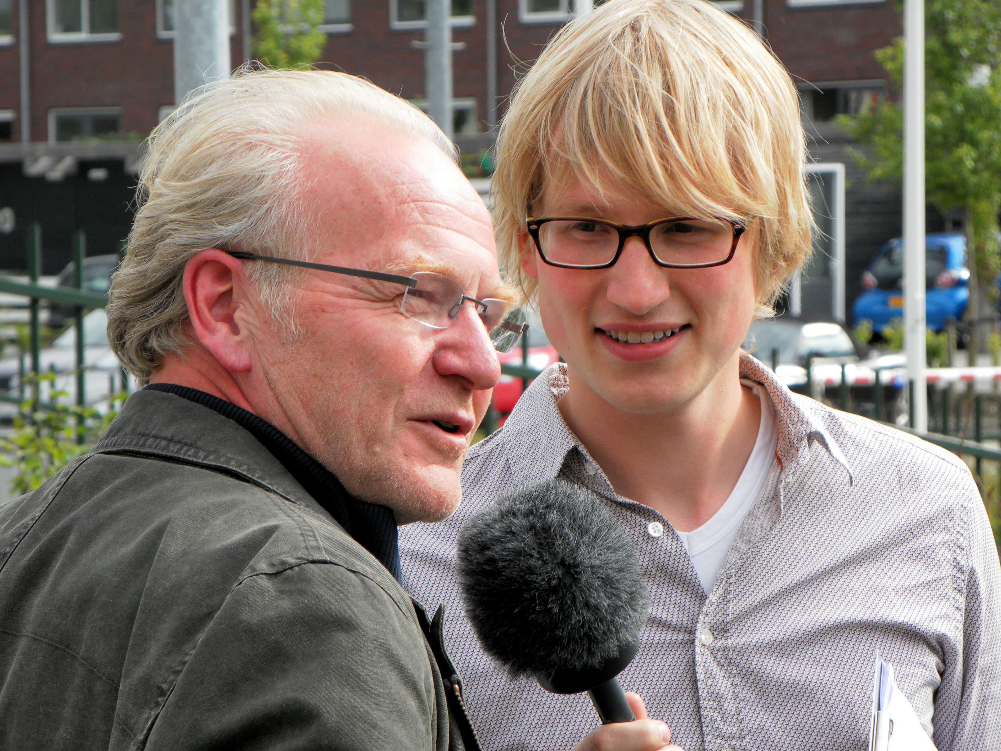 Bram Douwes interviewt Albert Geertjes in het kader van de Groningse Straatkunstprijs 2011.